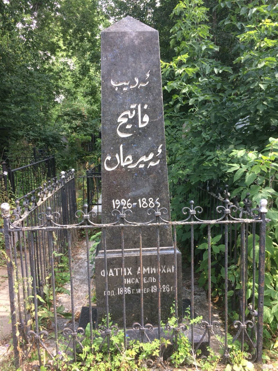 Татарча/tatarça: Фатих Әмирхан кабере